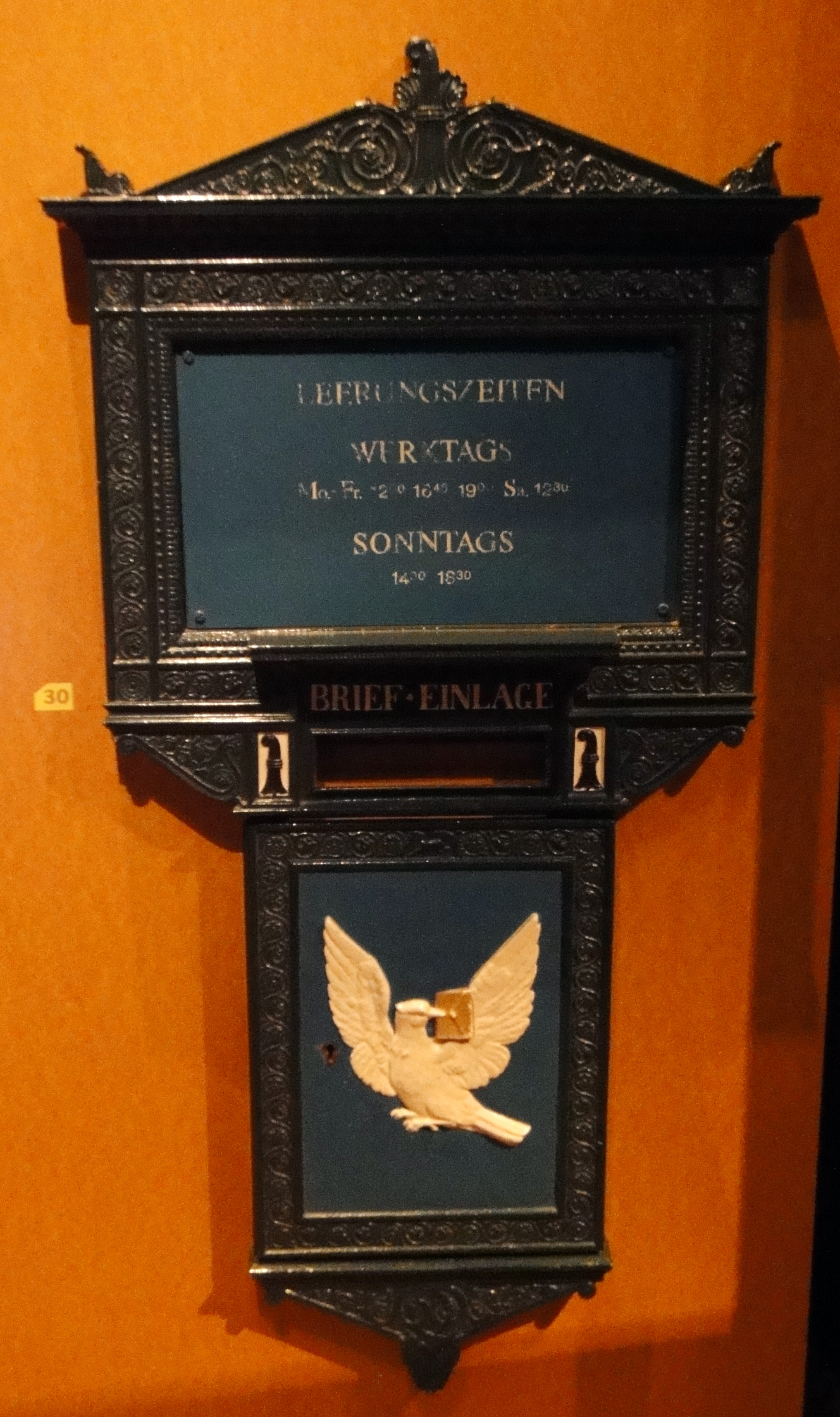 Verkleidung eines Mauerbriefkastens der Basler Kantonalpost, um 1845. Museum für Kommunikation Bern.